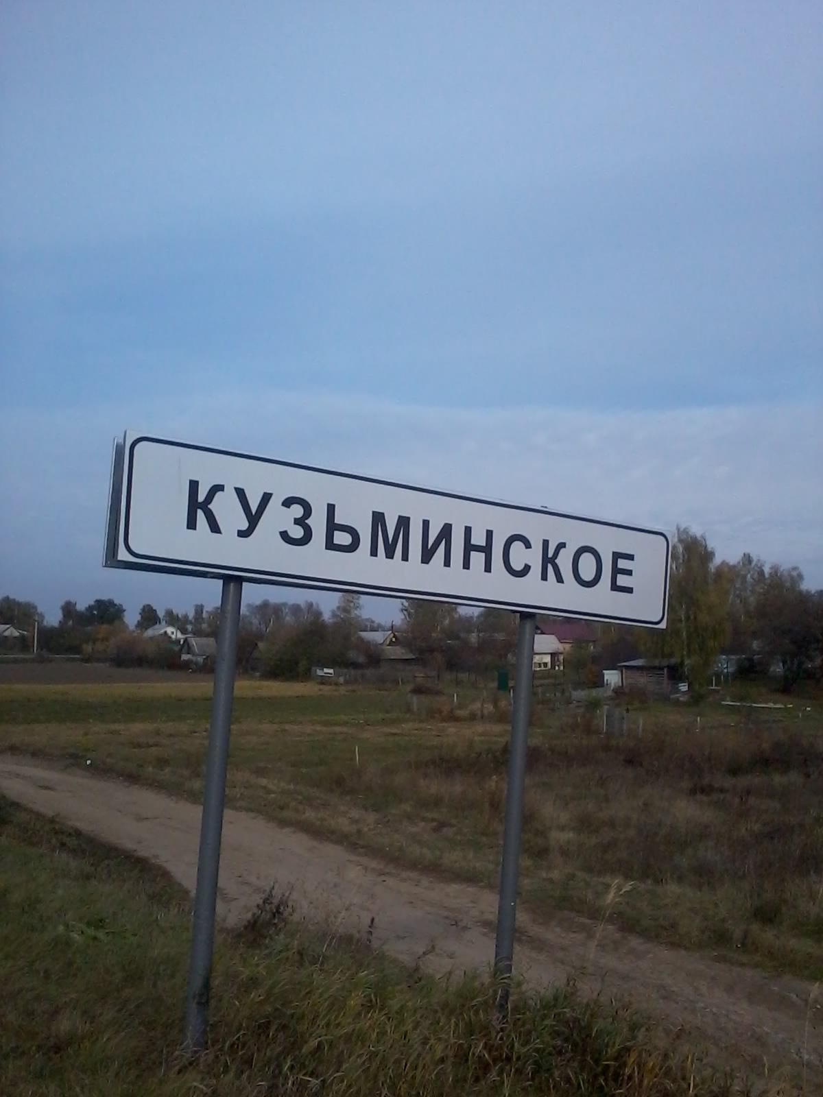 Кузьминское